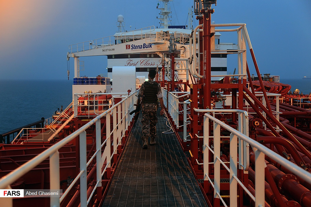 نفتکش انگلیسی استینا ایمپرو، توقیف‌شده توسط ایران